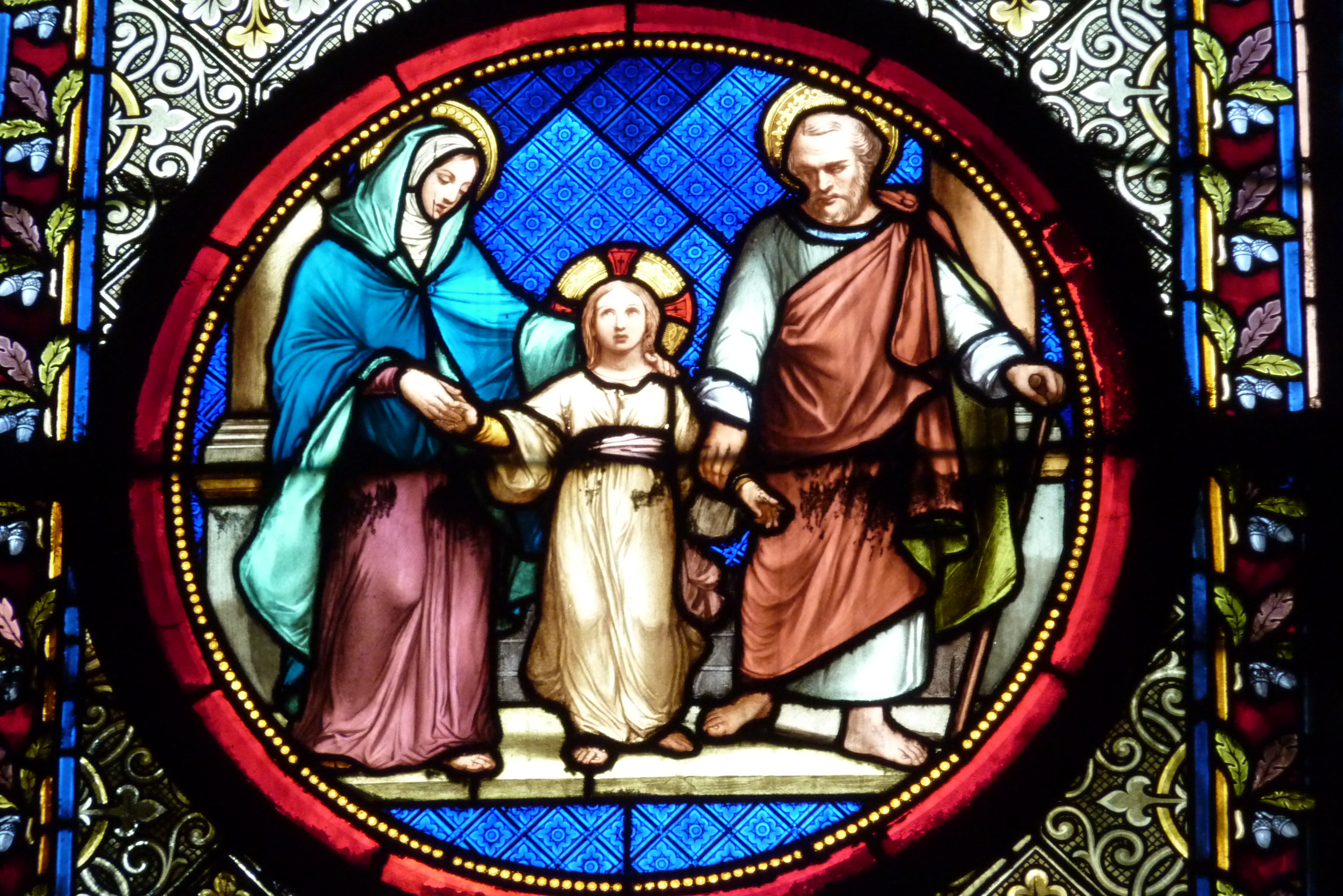 Bleiglasfenster Nr. 10 (Kapelle des Chorumgangs: Chapelle Saint-Joseph) in der katholischen Pfarrkirche Sainte Clotilde in Paris, Darstellung (Ausschnitt): Heilige Familie; Ausführung: Laurent & Gsell (siehe: Les vitraux de la basilique Sainte-Clotilde à Paris, Paris 1987, S. 19-21)